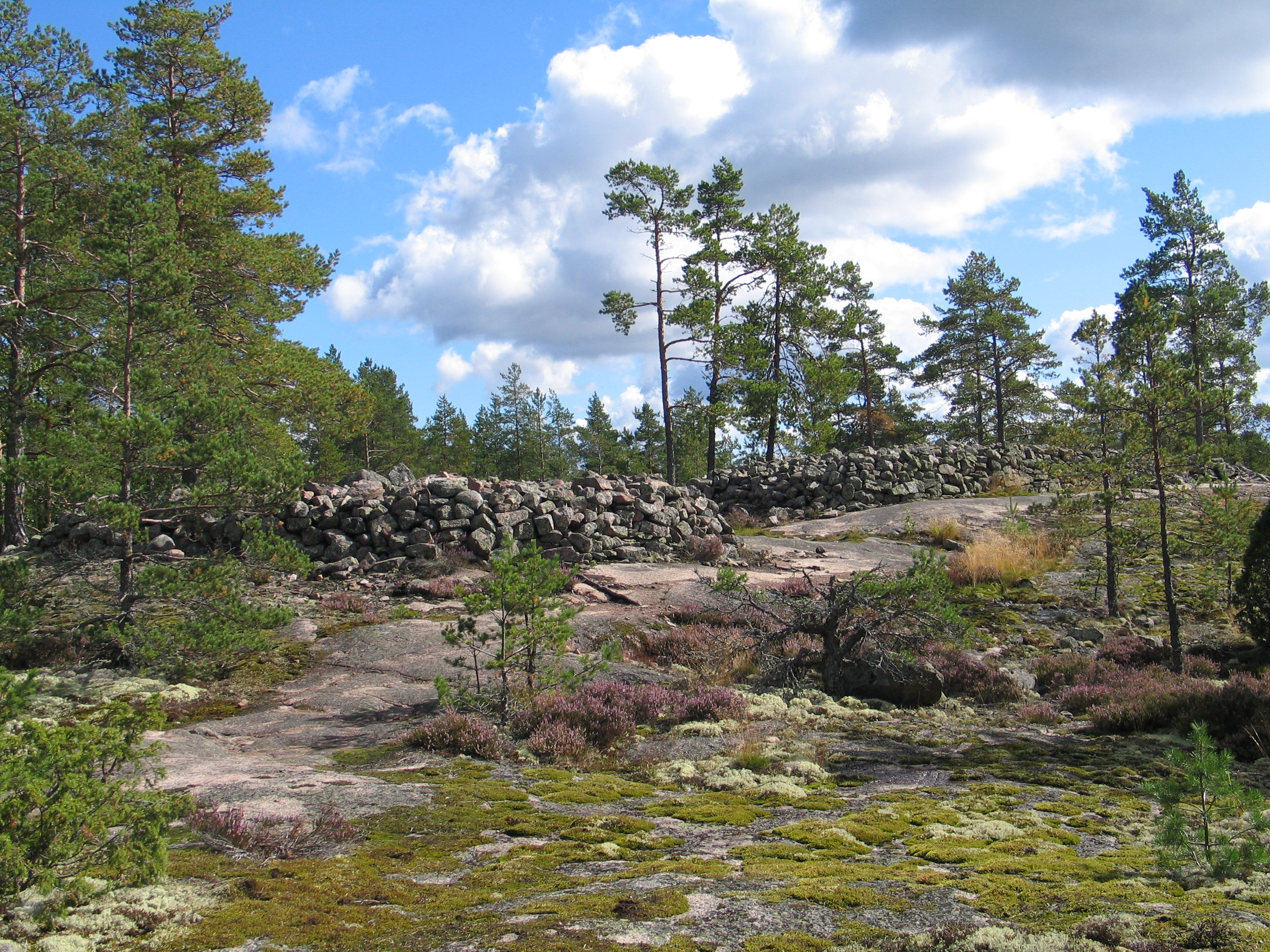 Sammallahdenmaki burial area (World heritage)